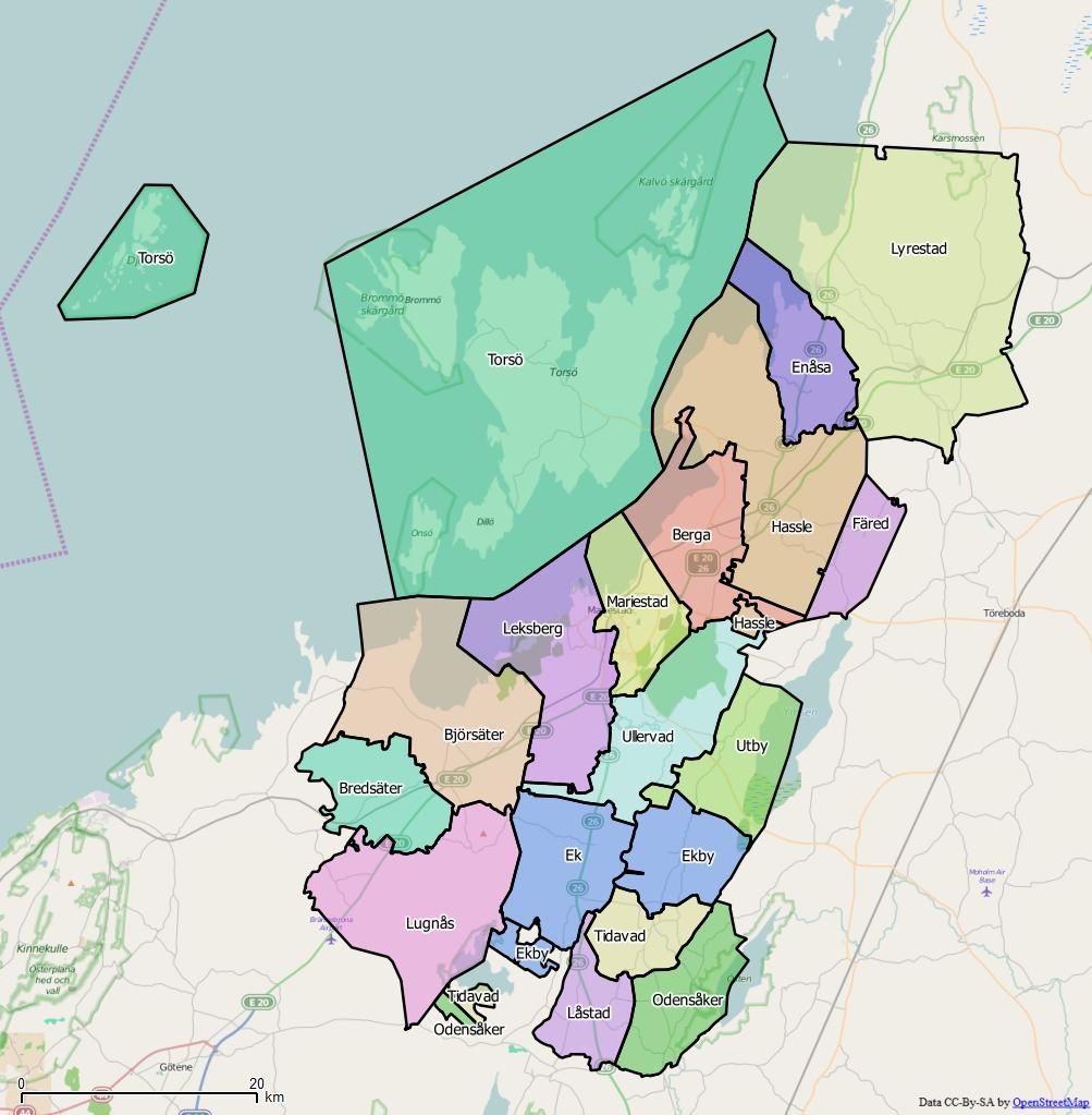 Distriktsindelningen i Mariestads kommun World file: 92.44835480094640445 0 0 -92.44835480094640445 1487028.59383484185673296 8169489.241729193367064